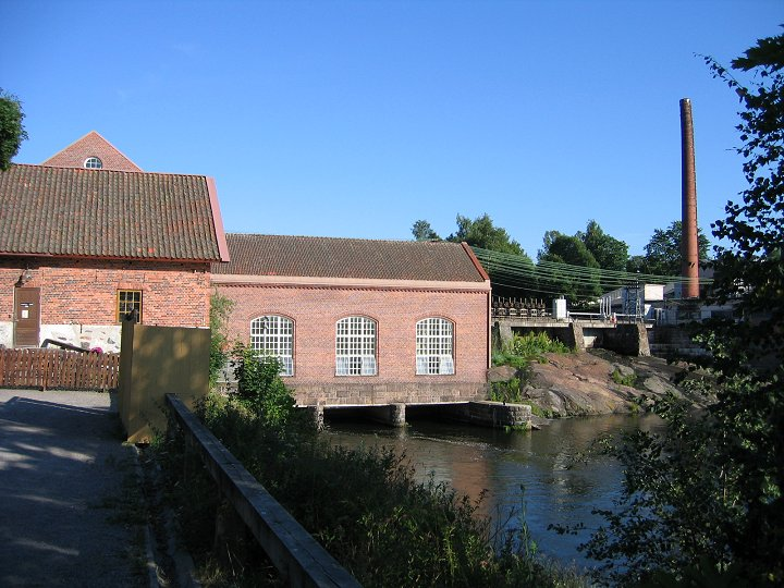 Mustionjoen museovoimalaitos, Billnäs (Pinjainen), myös nimellä Billnäs kraftverk. Lat= 60.086 N, Lon= 23.643 E. Kuvattu kesällä 2003. Voimalaitos on yksi neljästä Mustionjoen vesivoimalasta, jotka ovat ylhäältä Lohjanjärveltä alajuoksulle eli Pohjanpitäjänlahdelle päin mentäessä: Mustionjoki, Peltokoski (Åkerfors), Billnäs (Mustionjoen museovoimala) ja Åminnefors. Huom: Muista säilyttää viittaus kuvaajaan, mikäli käytät kuvaa.